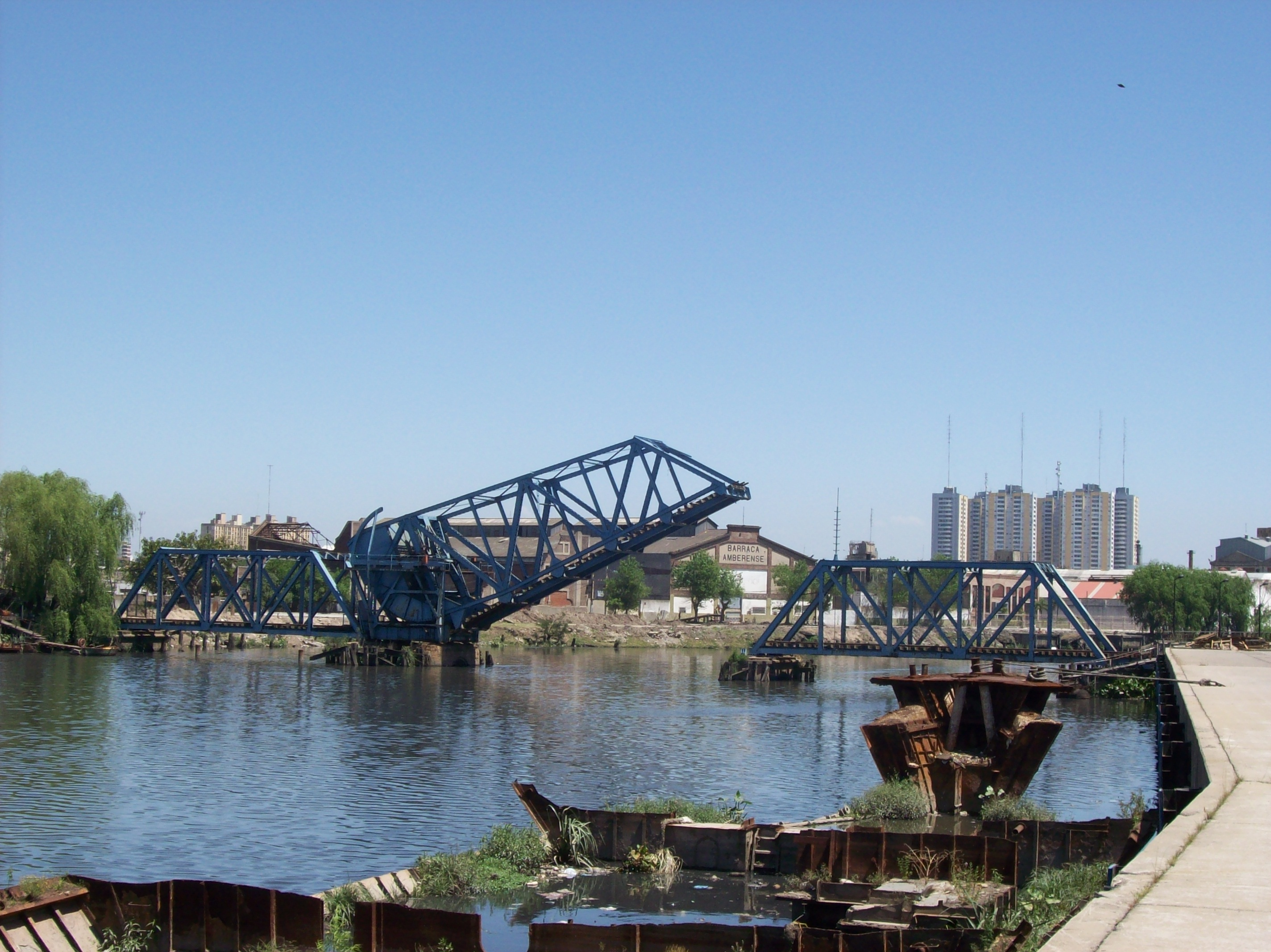 Puente Barraca Peña en el momento de la apertura de la parte central. Este puente de ferrocarril cruza el Riachuelo uniendo el barrio de La Boca en la Ciudad de Buenos Aires con el Partido de Avellaneda, Provincia de Bueno Aires, Argentina.